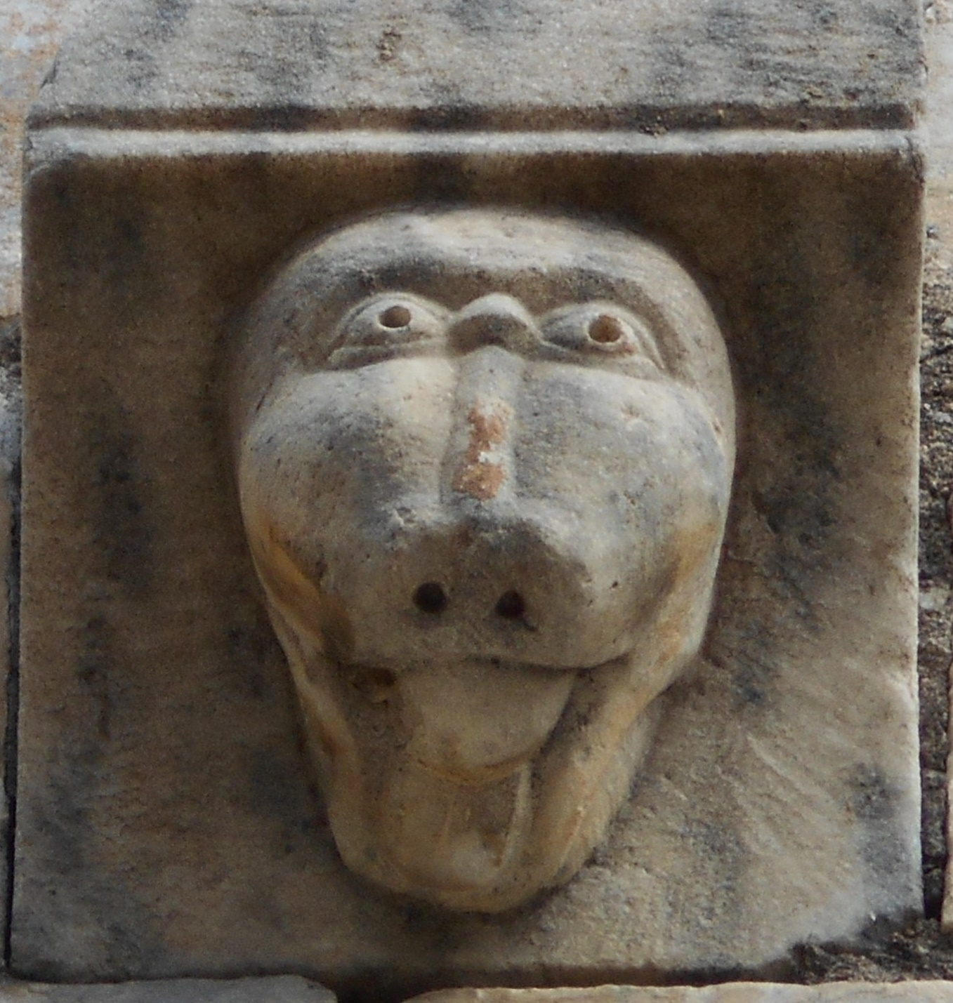 Mènsula de la portada de Sant Genís de Fontanes